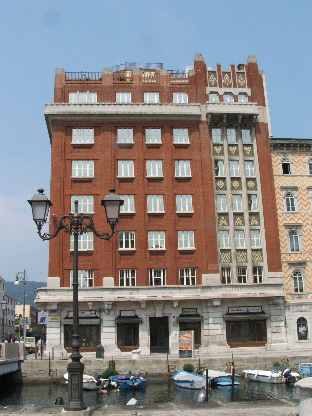 Immagine da Trieste, Friuli-Venezia Giulia, Italia.